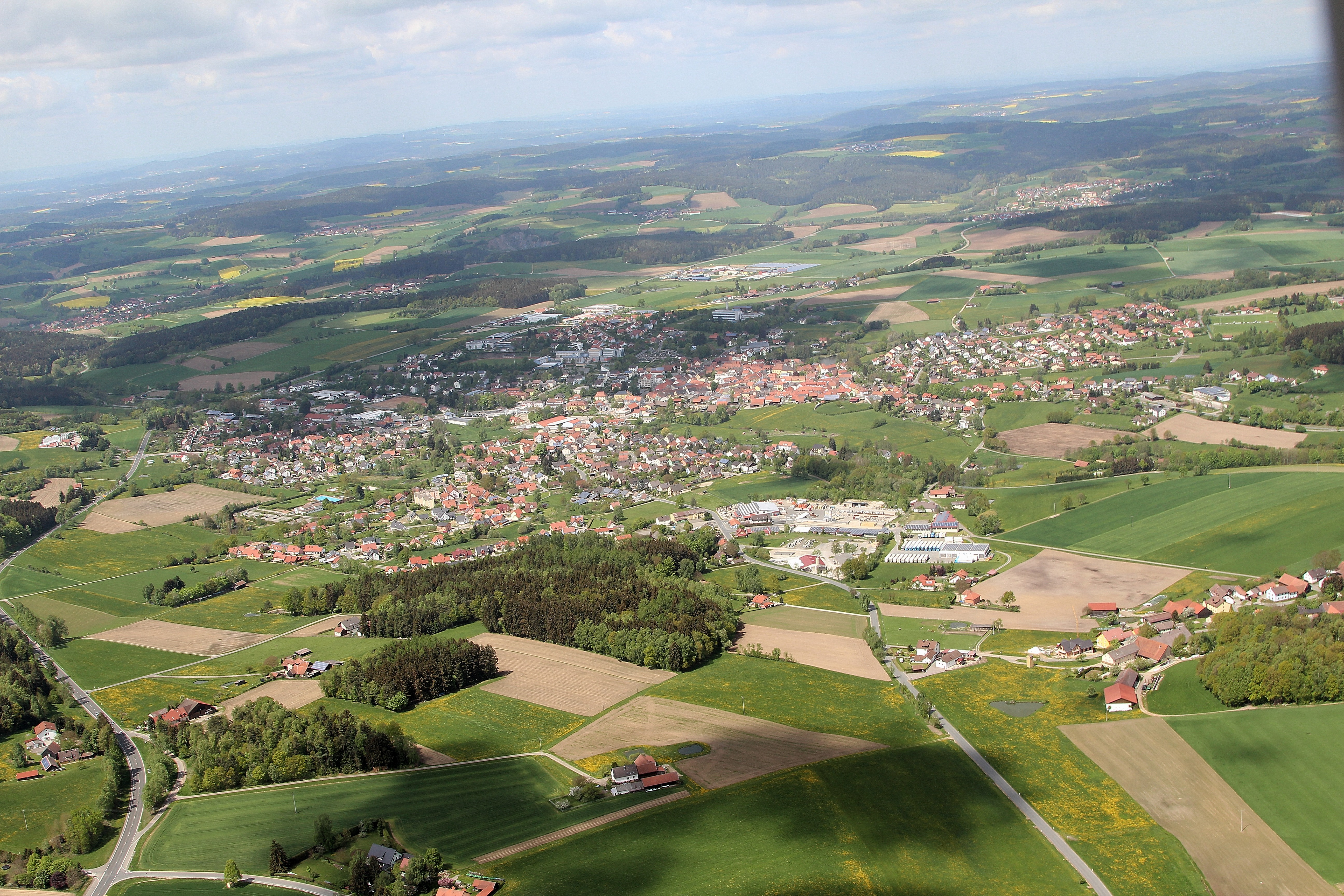 Oberviechtach